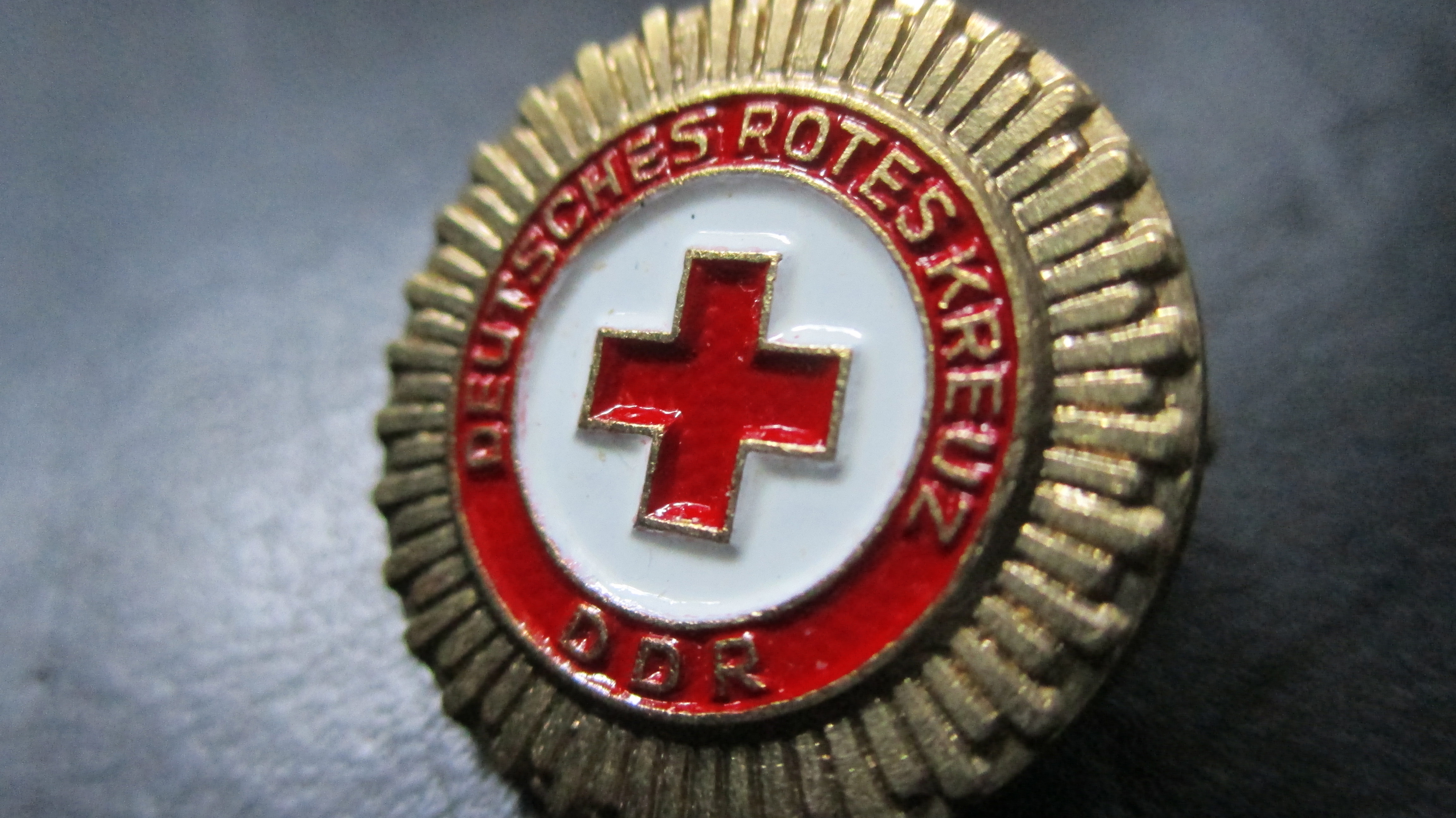 Treue-Abzeichen des DRK (DDR) in GOLD